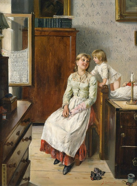 Deitsch: Erwacht